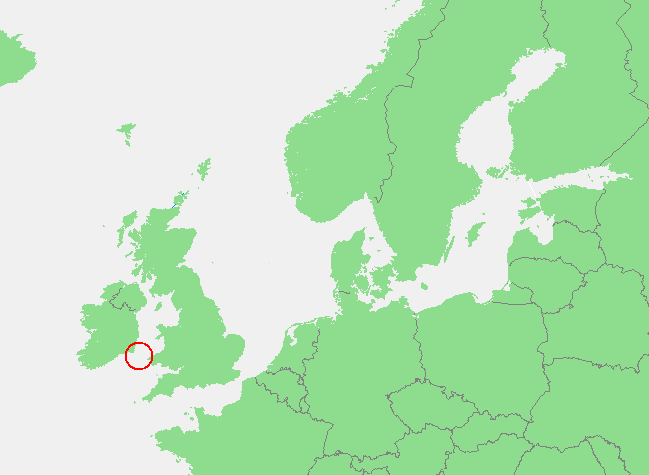 Sint-Georgekanaal /St George's Channel, Saint George's Channel